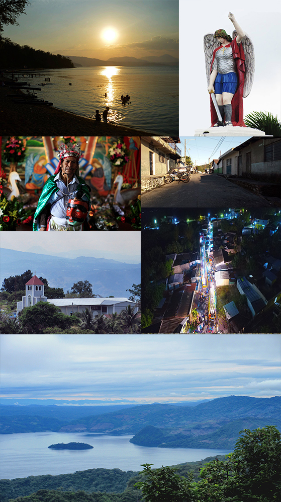 De arriba hacia abajo y de izquierda a derecha: Atardecer en la Playa Poza Verde; La imagen del patron del municipio San Miguel Arcangel en la plaza publica; Un miembro de la danza de los Historiantes, una tradicion antigua; Calle principal del barrio El Carmen; La iglesia parroquial de la poblacion; Vista aerea de la feria durante fiestas patronales en el mes de septiembre y la vista panoramica del Lago de Ilopango con enfoque a la Isla de Los Patos